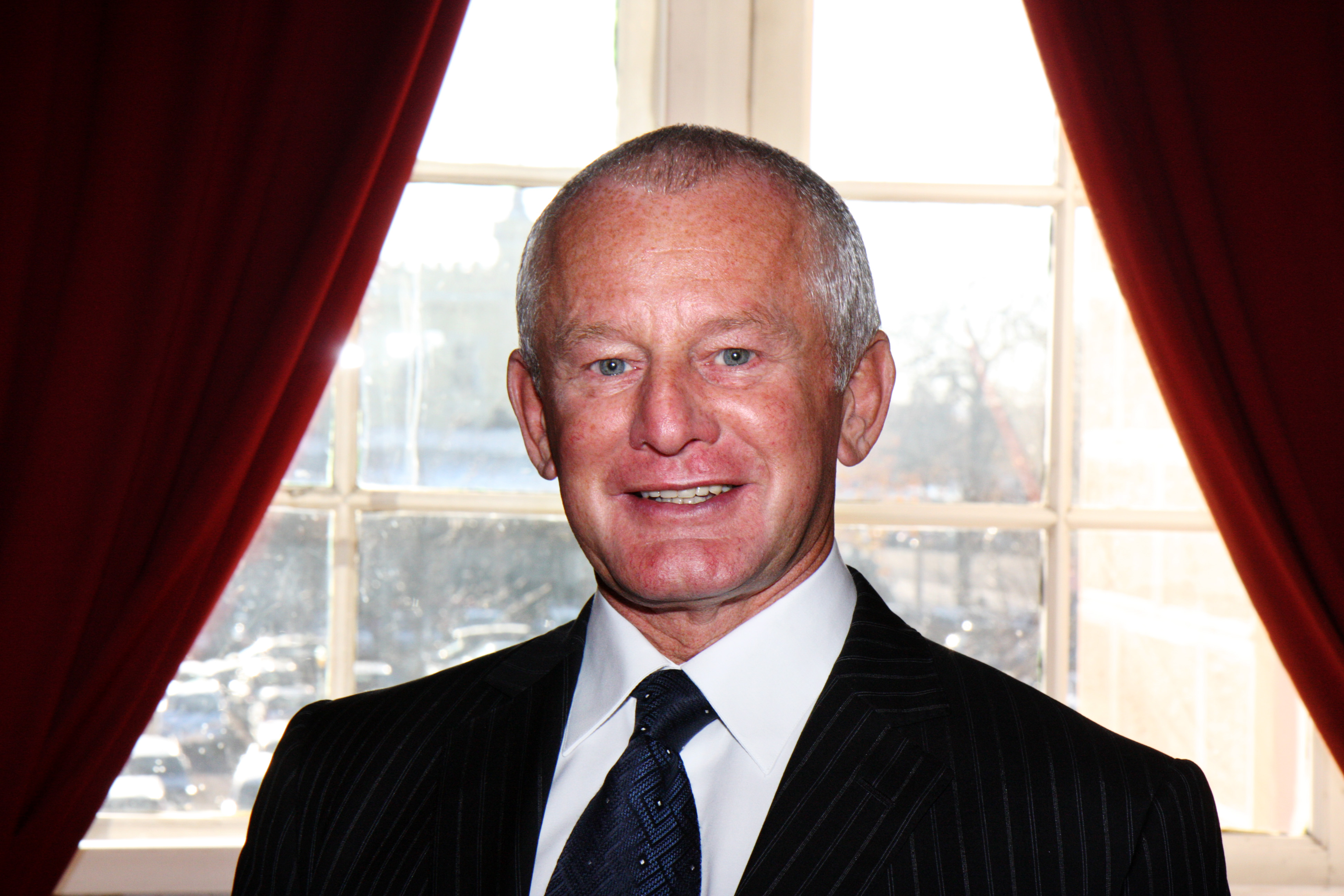 Isle of Mans finansministrar Alan Bell skriver under avtal tillsammans med sina nordiska kollegor vid Nordiska Rådets session i Oslo. 2007-10-30. Foto: Magnus Fröderberg